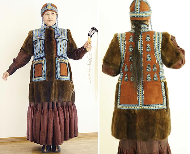 Женщина в традиционном якутском костюме (таналай сон). Снято во время конкурса костюмов в 2012г.